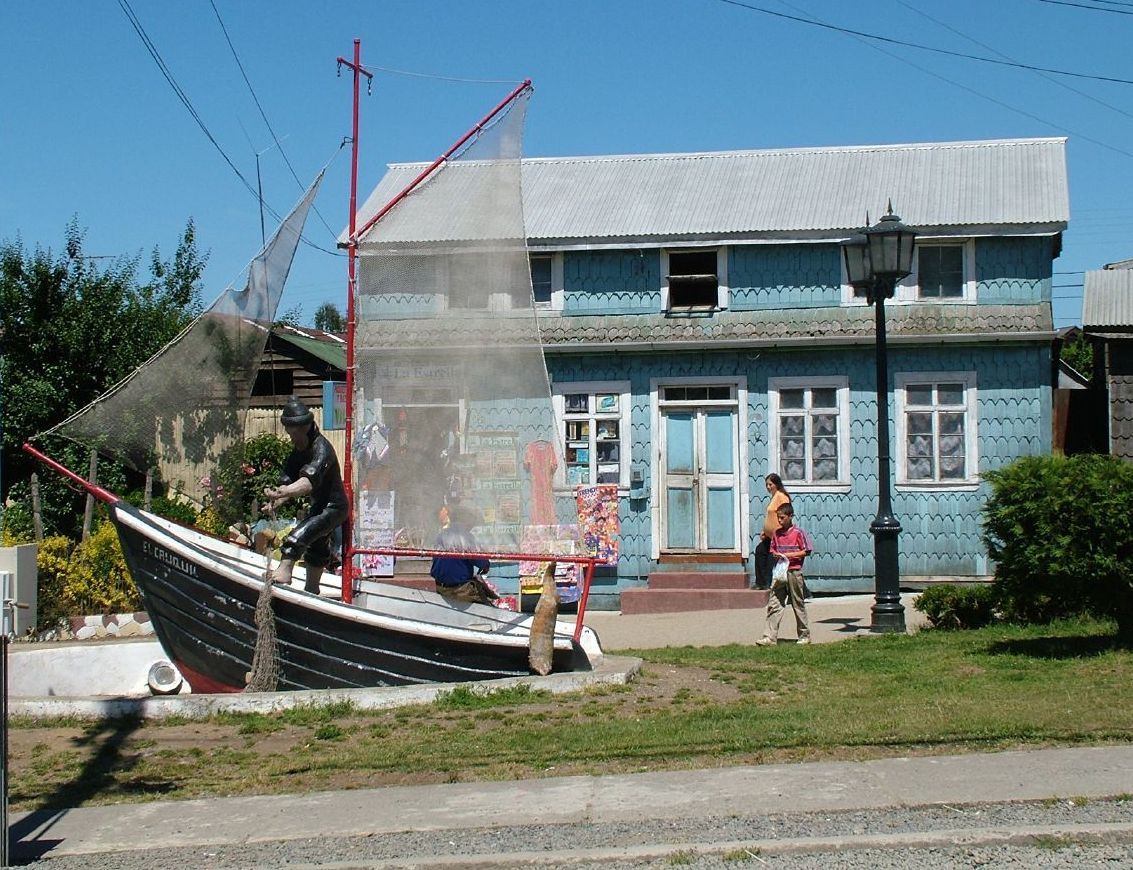 Monumento a los pescadores artesanales, en Dalcahue, Chiloé (Chile)